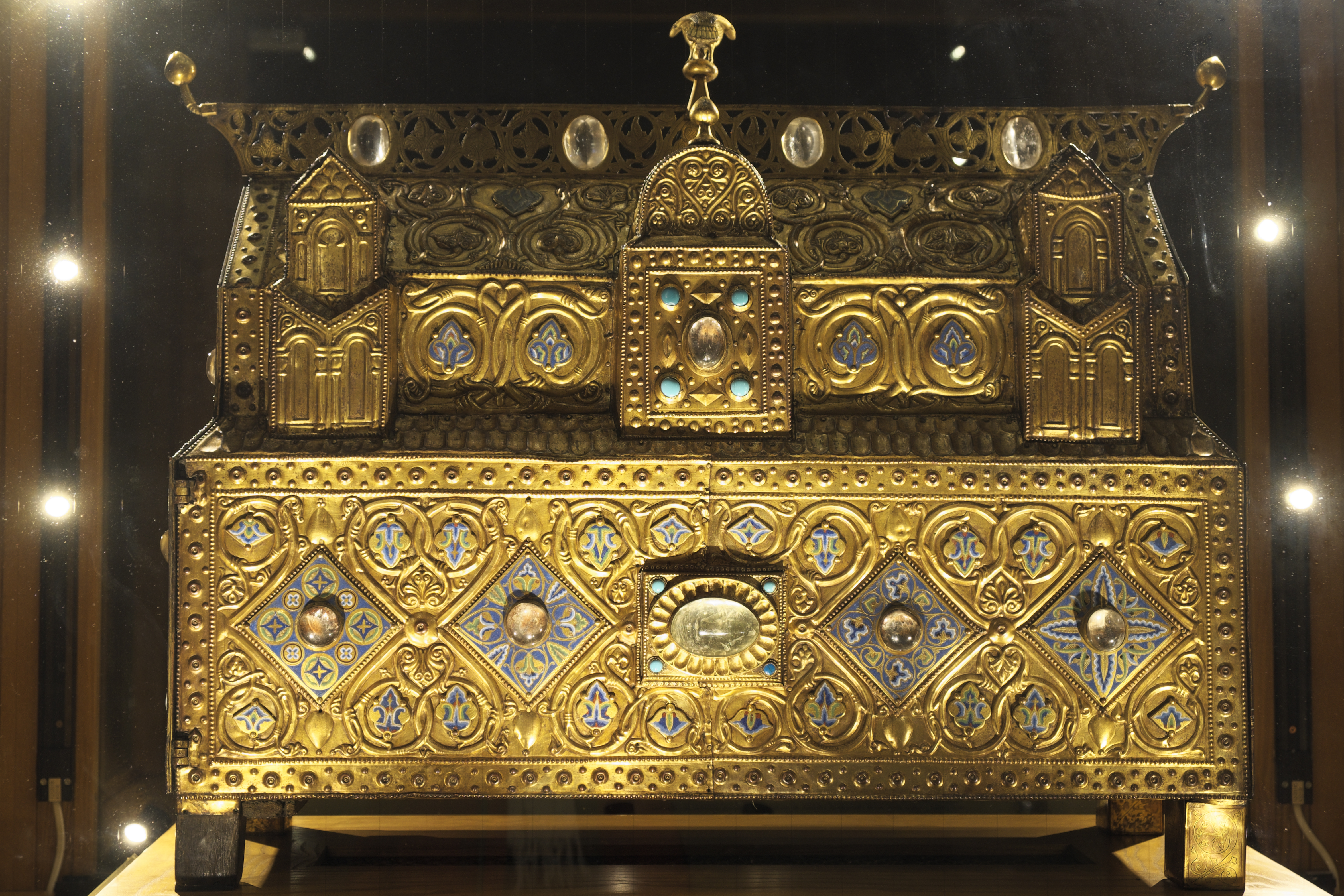 Katholische Pfarrkirche Saint-Antoine in Ambazac im Département Haute-Vienne (Nouvelle-Aquitaine/Frankreich), Reliquienschrein von Ambazac, zwischen 1180 und 1200